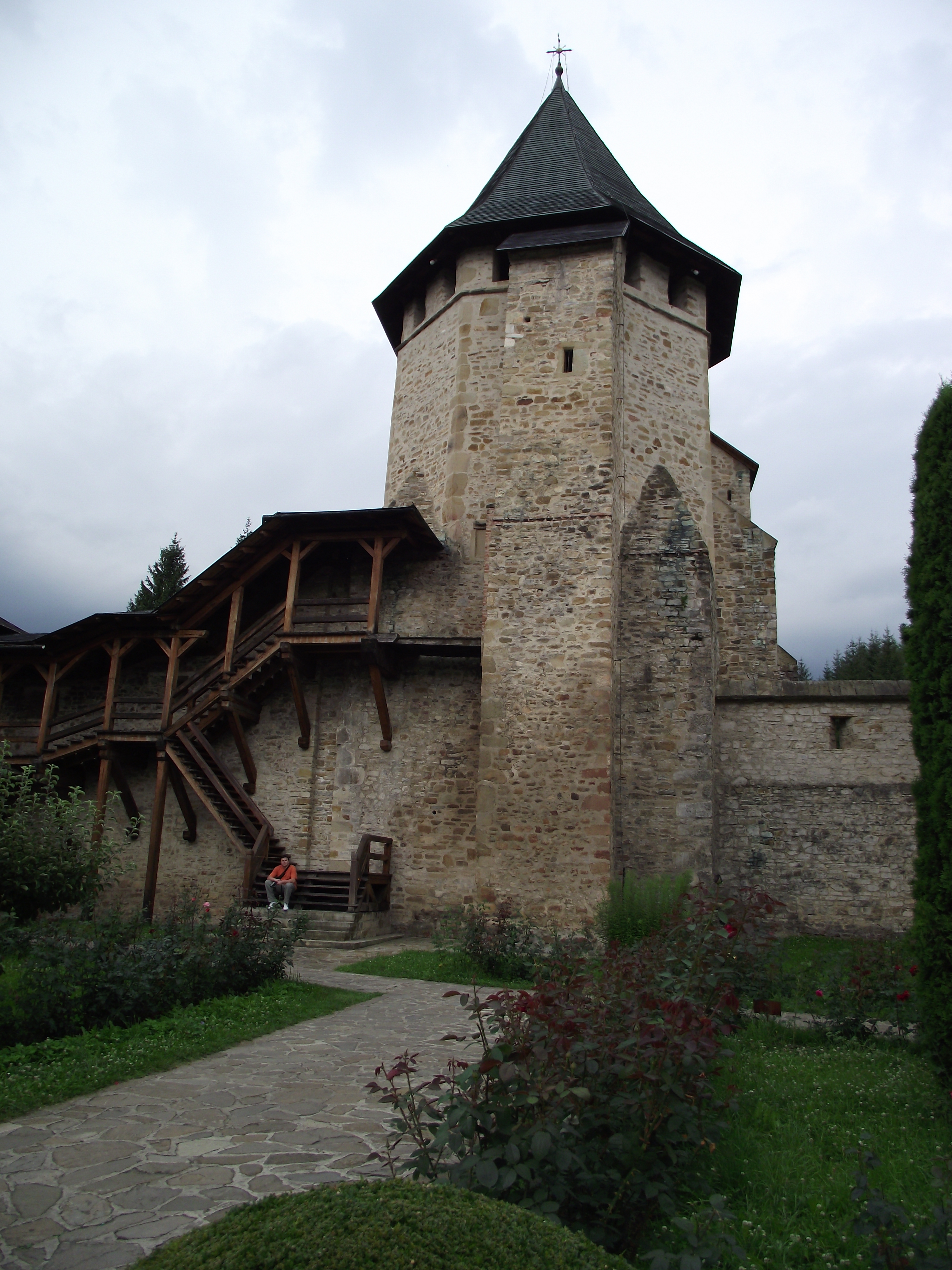 Turnul Tezaur - Manastirea Putna - plan frontal 03